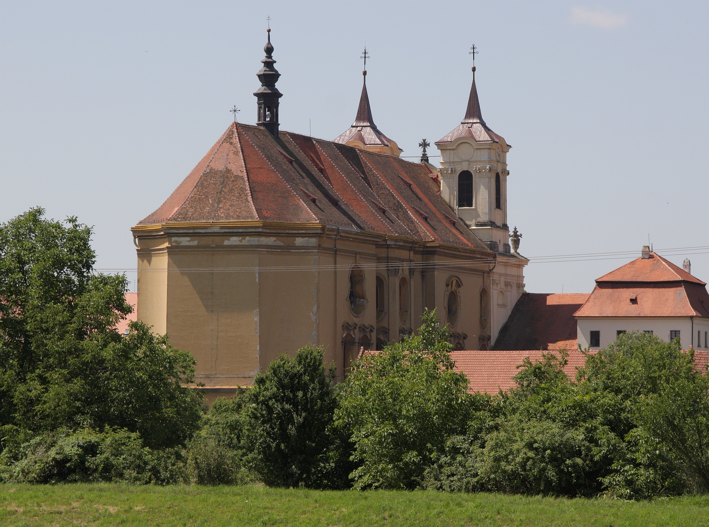 Rajhrad - Kostel svatého Petra a Pavla od Rajhradic. Pohled na loď a presbytář.